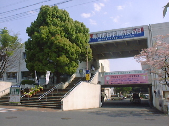 Seya-ku Ward Office, Seya-ku, Yokohama, Kanagawa, Japan (瀬谷区役所)